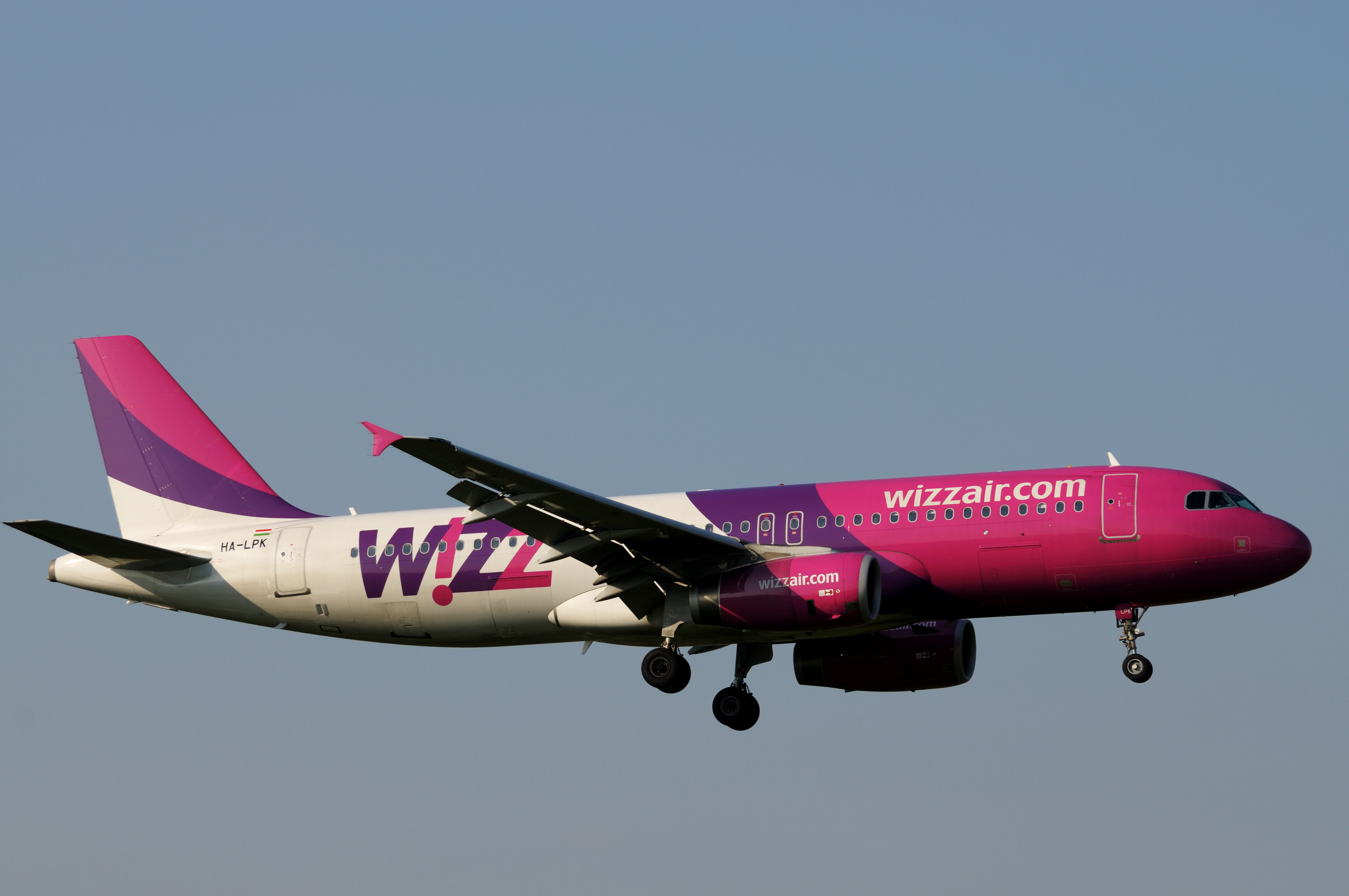 Airbus A320-232 HA-LPK WizzAir